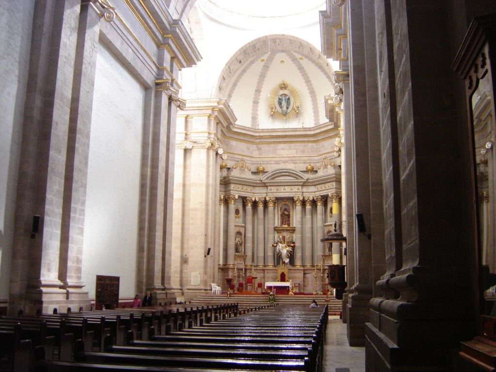 Interior de la Catedral Metropolitana de Tulancingo